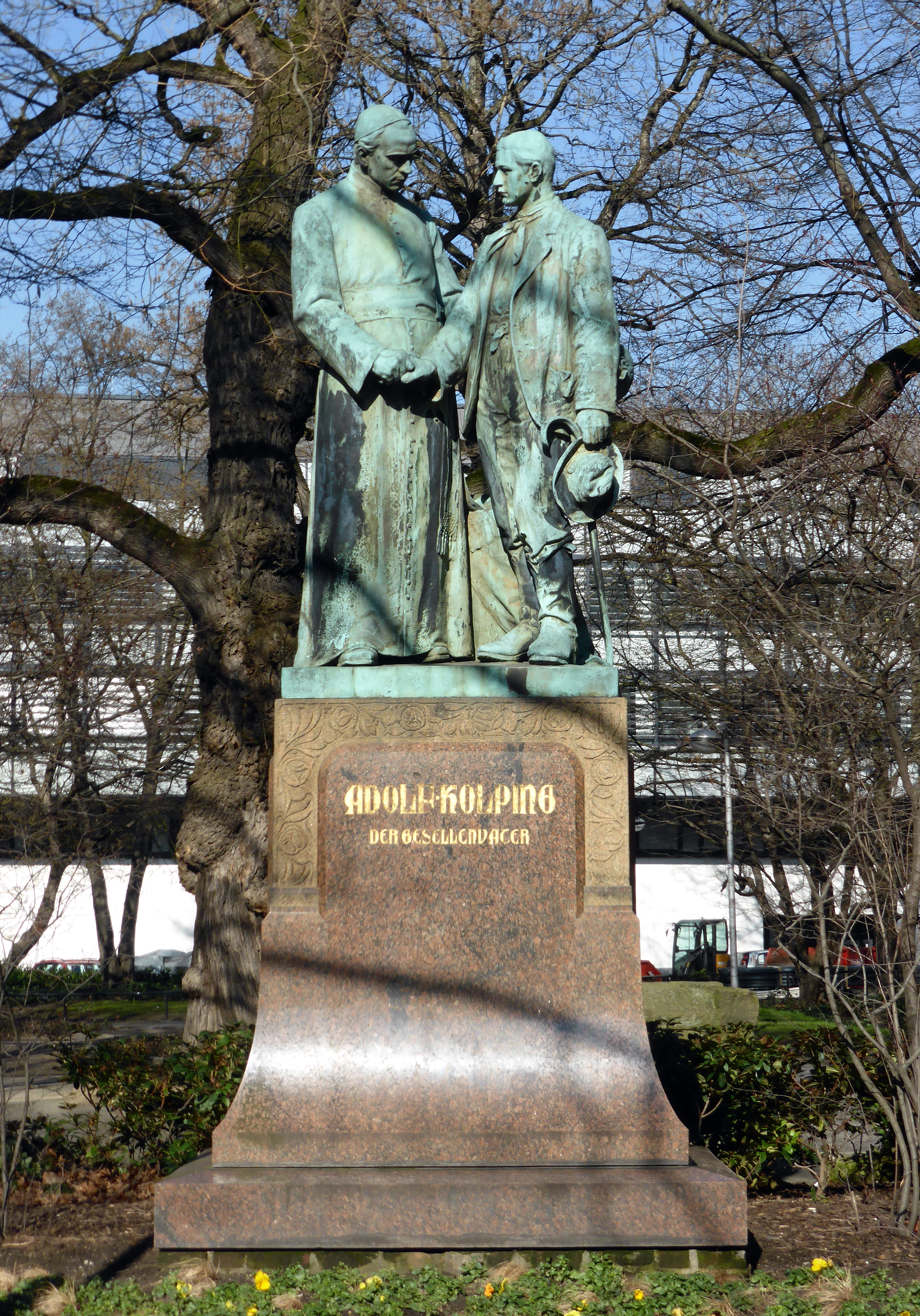 Adolph Kolping-Denkmal, Kolpingplatz, Köln-Altstadt-Nord. Bronceguss Förster u. Kracht Düsseldorf 1903; Bildhauer Johann Baptist Schreiner. This is a photograph of an architectural monument.